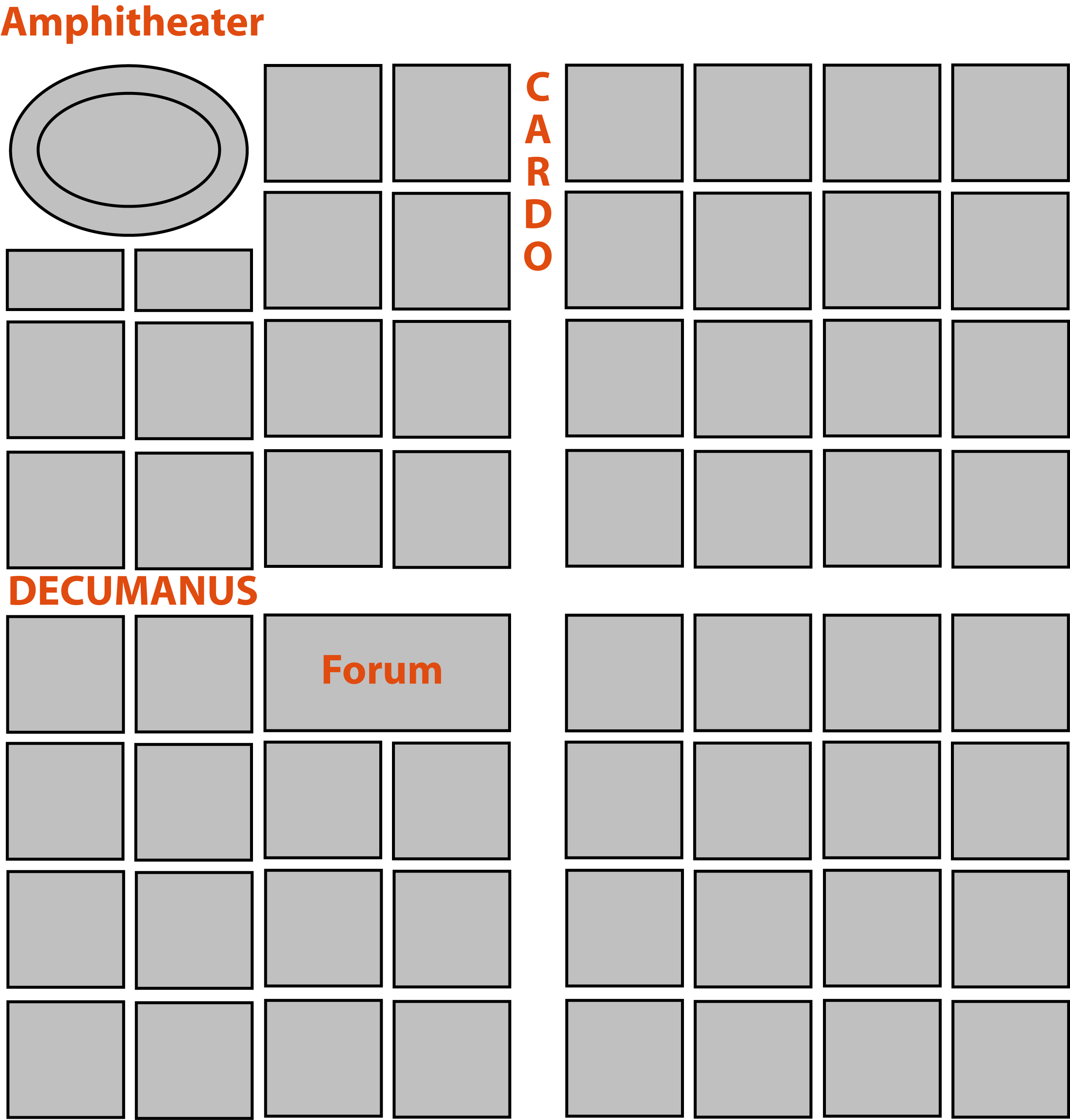 Drawed by User:Leo2004